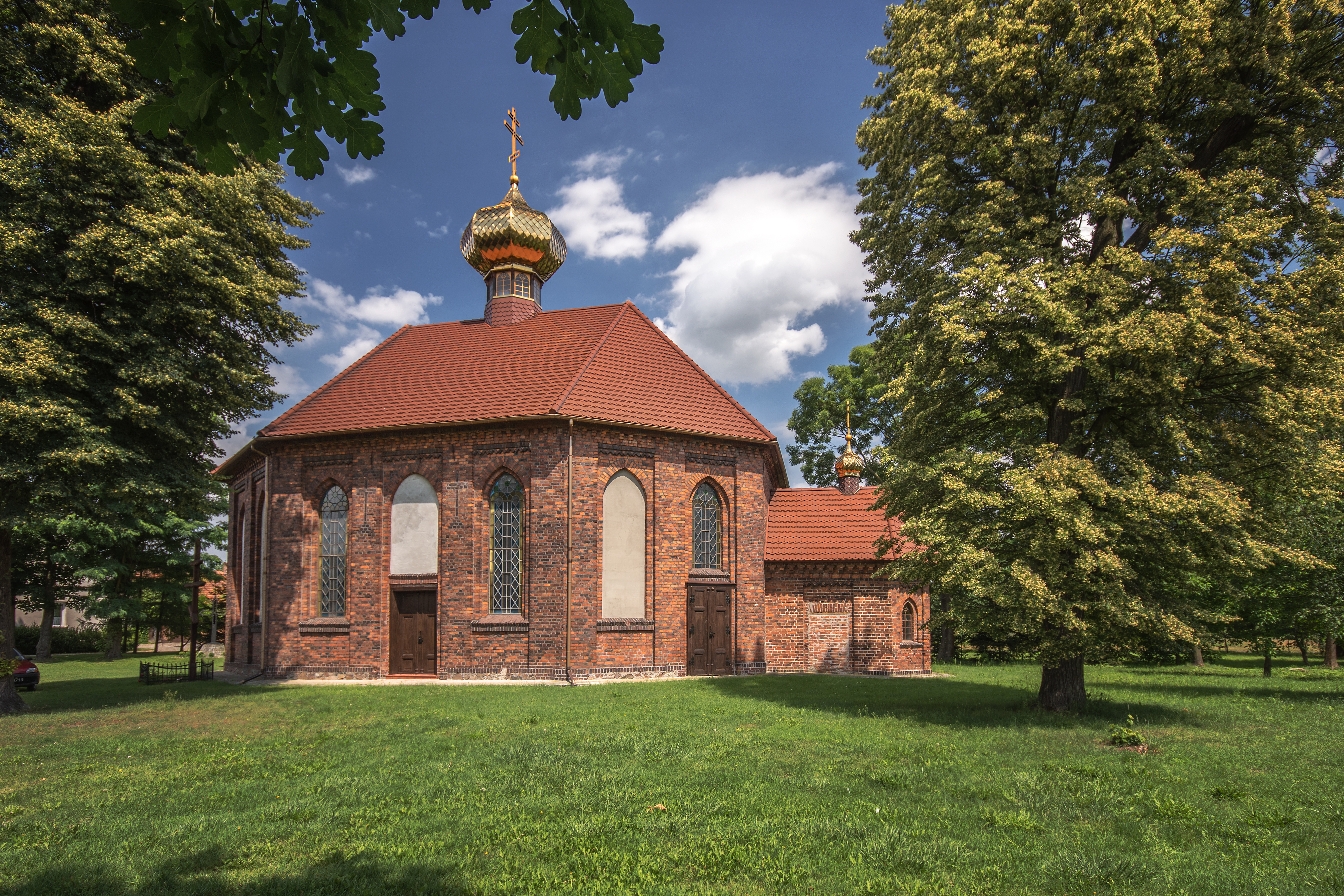 Cerkiew św Dymitra Sołuńskiego, d. kościół ewangelicki, Buczyna, gm. Radwanice, pow. polkowicki, woj. dolnośląskie